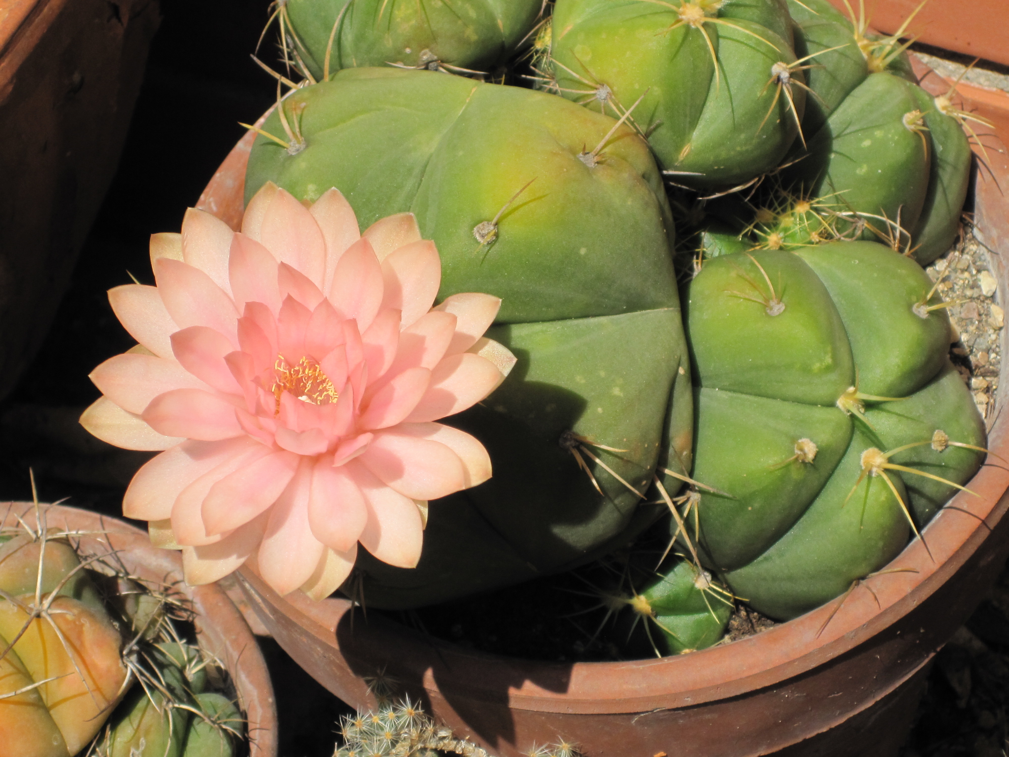 Gymnocalycium horstii in fiore